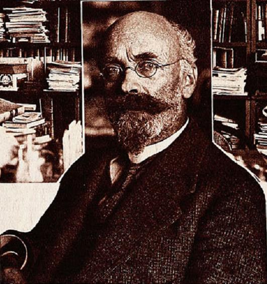 Rudolf Lenz Danziger, más conocido como Rodolfo Lenz (Halle, Sajonia, 10 de septiembre de 1863 - Santiago, 7 de septiembre de 1938), fue un lingüista, filólogo, lexicógrafo y folclorista alemán naturalizado chileno.